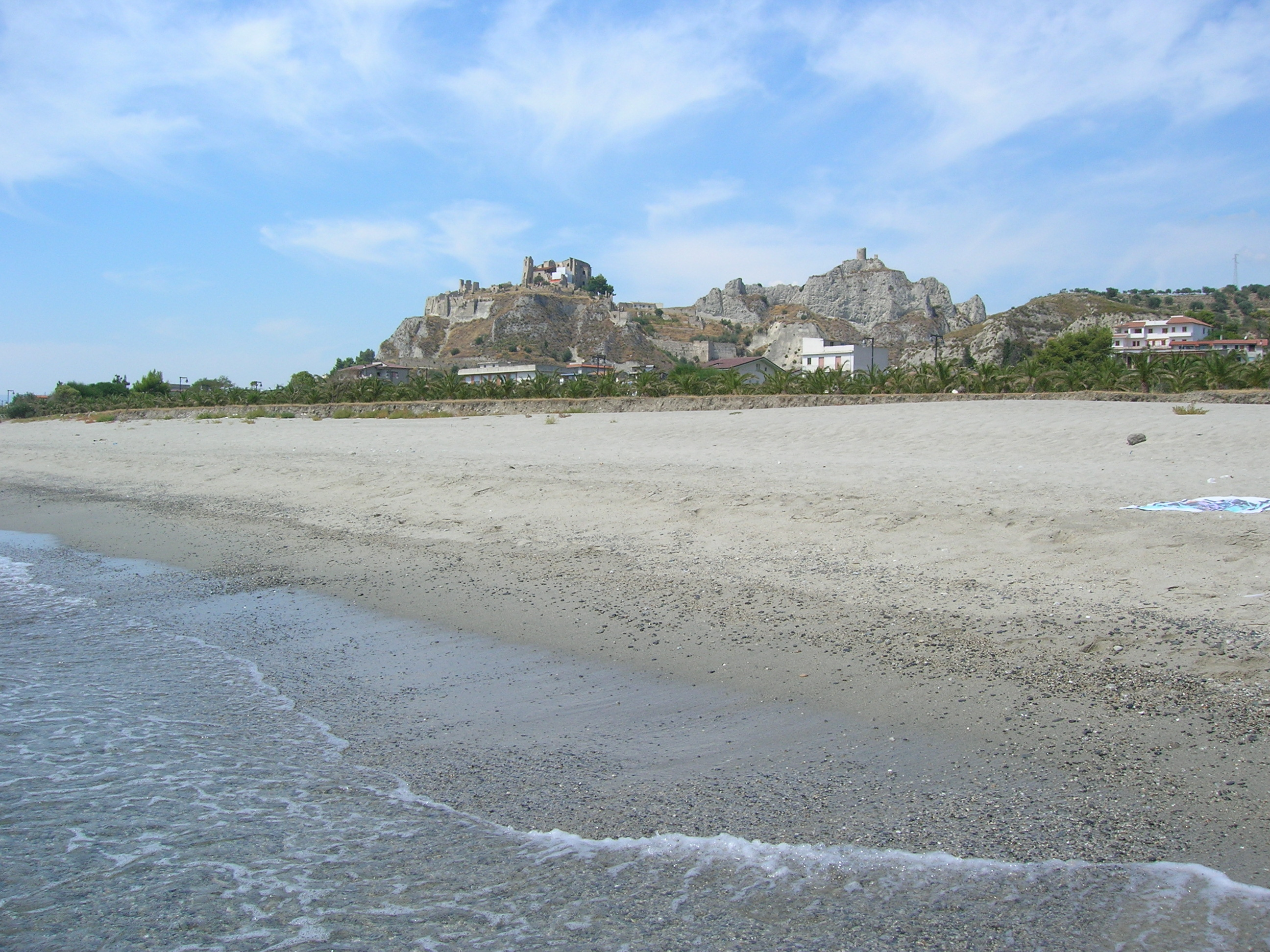 Roccella Jonica, spiaggia e rocca del Castello. sono io l'autore della foto